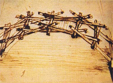 Арочный мост (рисунок Леонардо да Винчи)